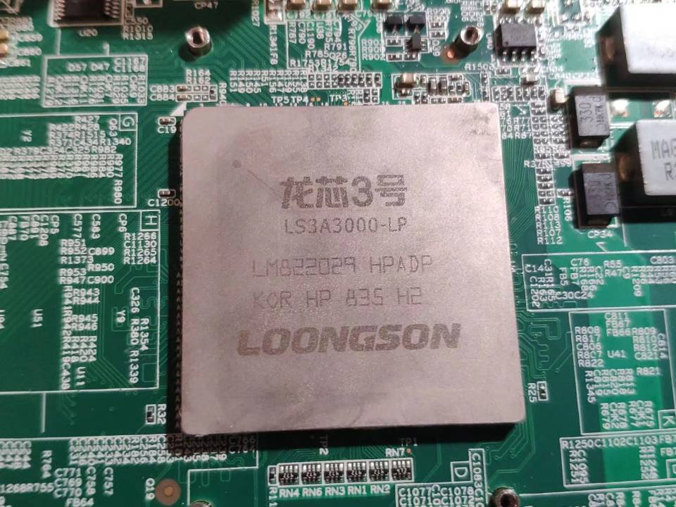 龙芯3A3000芯片正面照